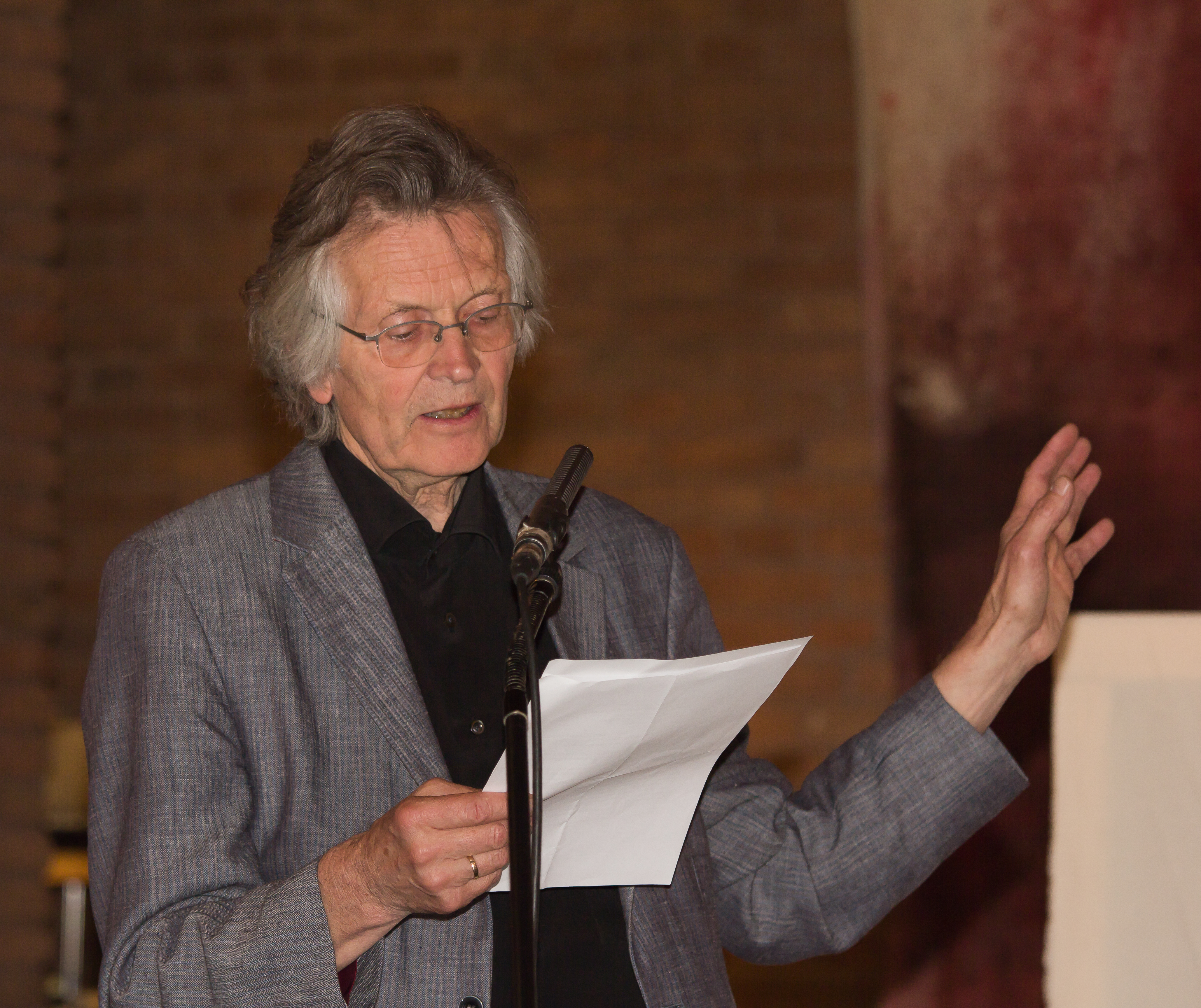 Peter Busmann, Architekt, verliest ein Grußwort von Dani Karavan, der an der Finissage zur Ausstellung "Dani Karavan - Gedenkorte und Environments" in der Lutherkirchen, Köln, nicht teilnehemn konnte.